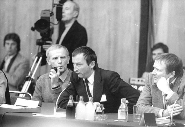 ADN-ZB-Senft-29.12.81-schl-Berlin : An der Berliner Begegnung zur Friedensförderung von Schriftstellern, Künstlern und Wissenschaftlern aus europäischen Ländern vom 13. bis 14. Dezember 1981 nahmen Günter de Bruyn, Prof. Dr. Axel Azzola und Wolfgang Kohlhaase (v.l.n.r.) teil.